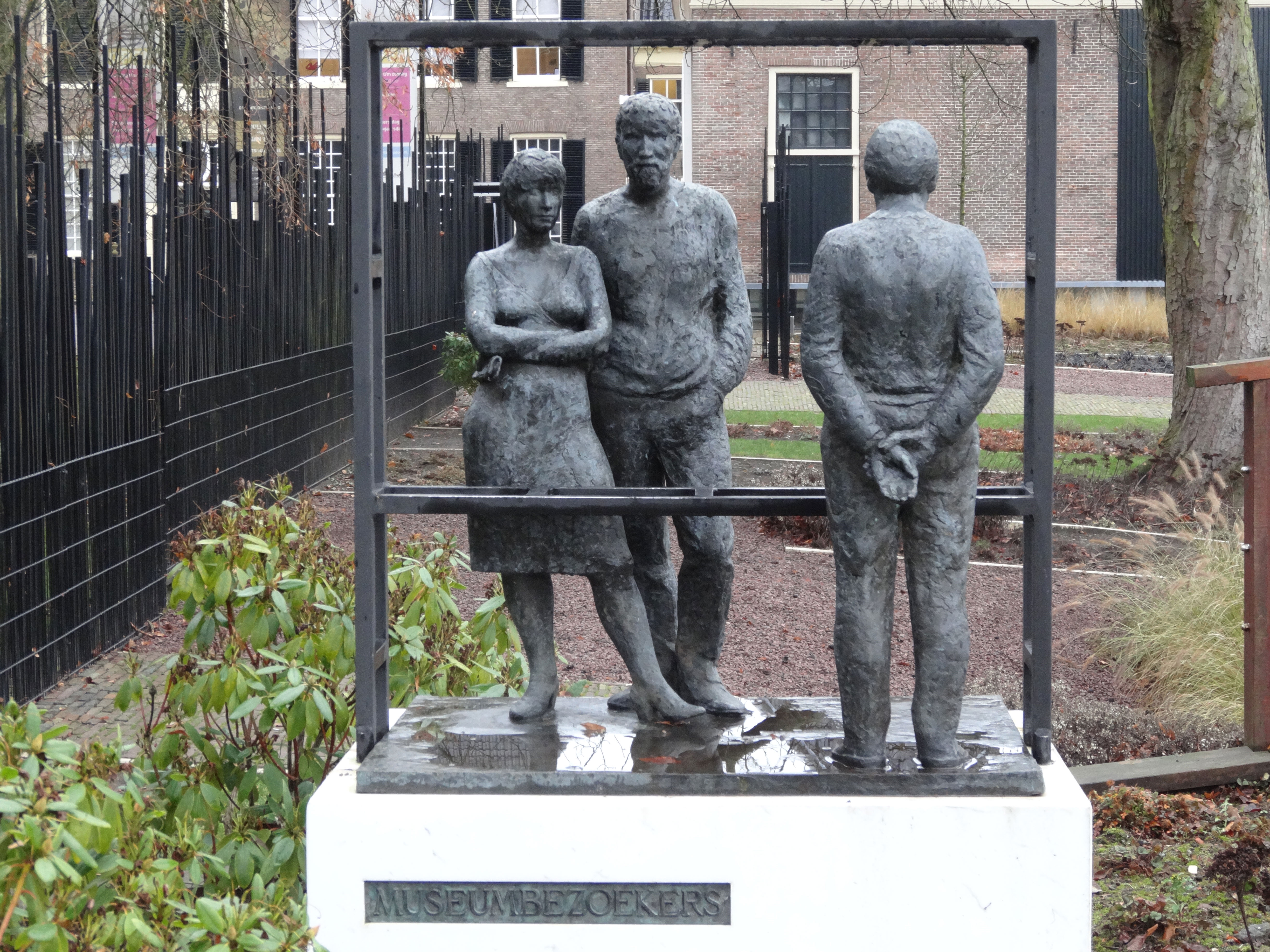 Museumbezoekers door Bert Kiewiet in Assen